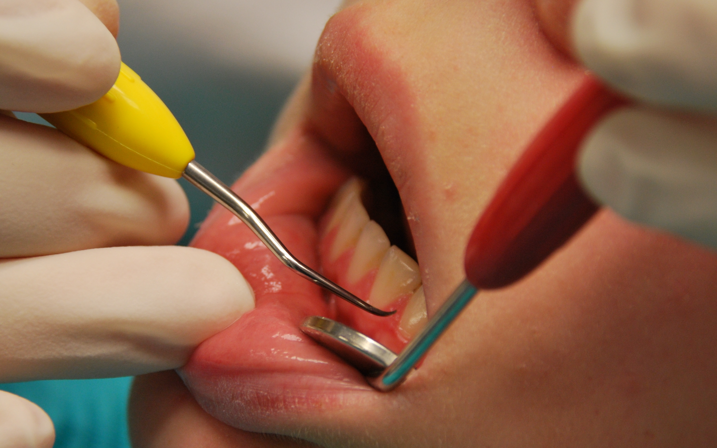 Dentali hygiena - kyreta v ustech pacienta